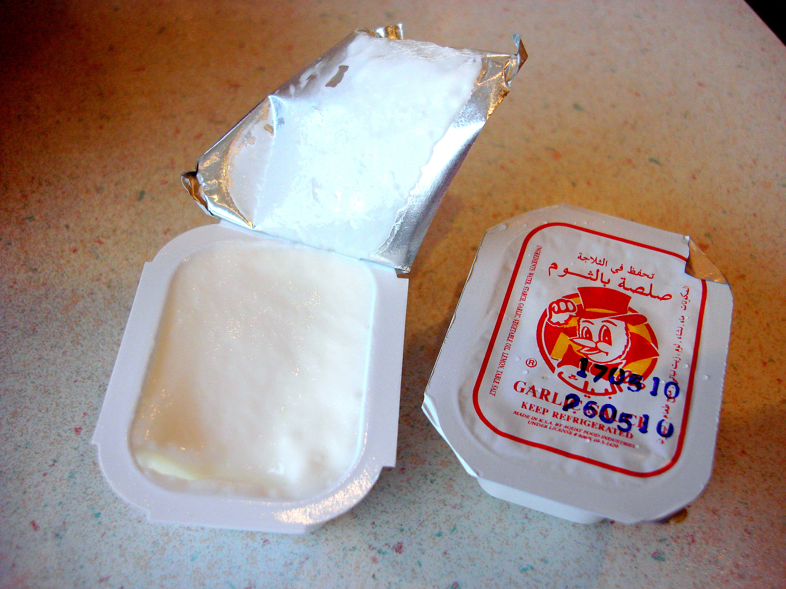 سلطة ثوم البيك